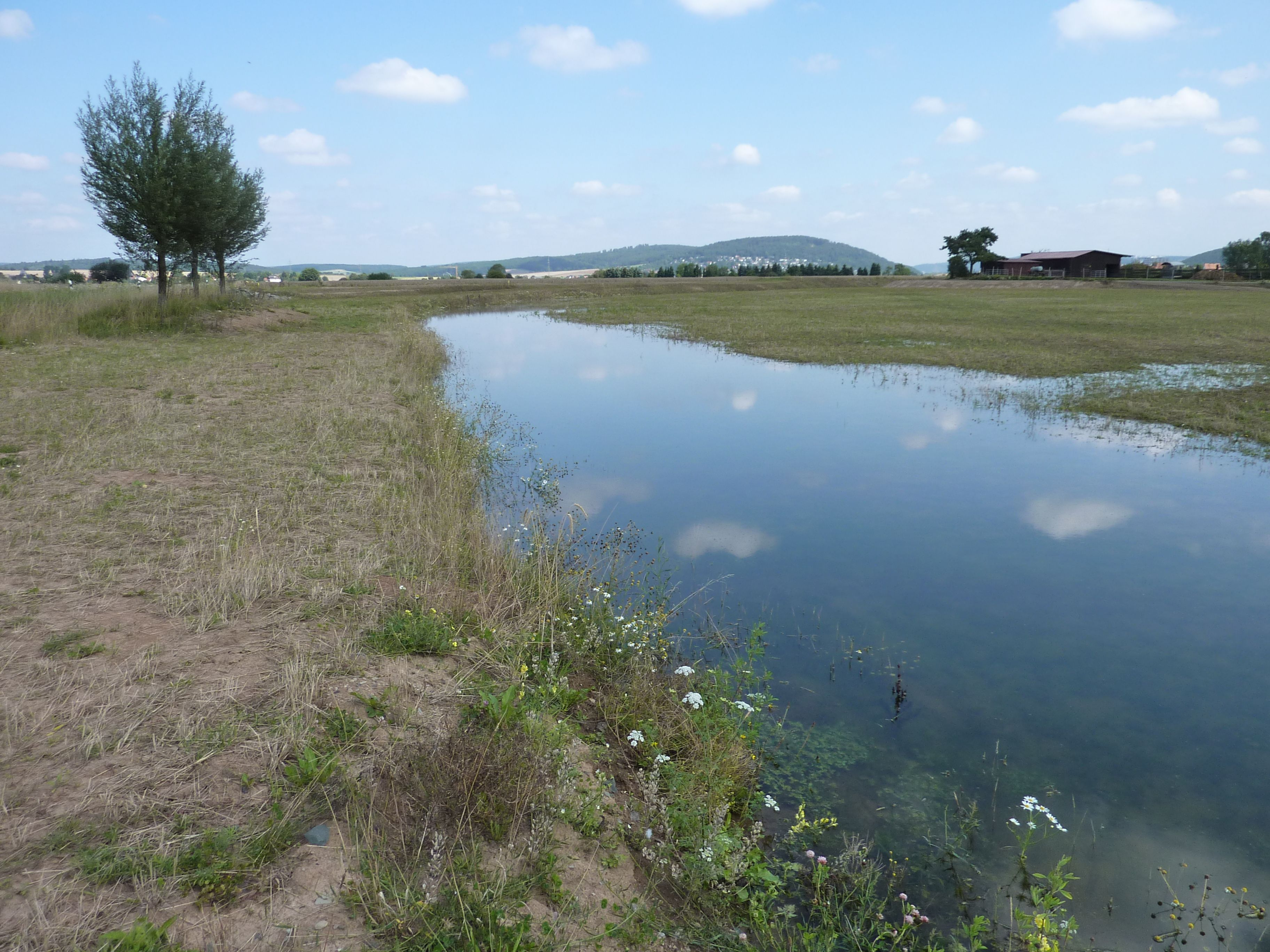 Die Par-Allna; im Hintergrund der Weimarsche Kopf, südlichster Berg des Marburger Rückens mit Niederweimar an seinem Fuße.